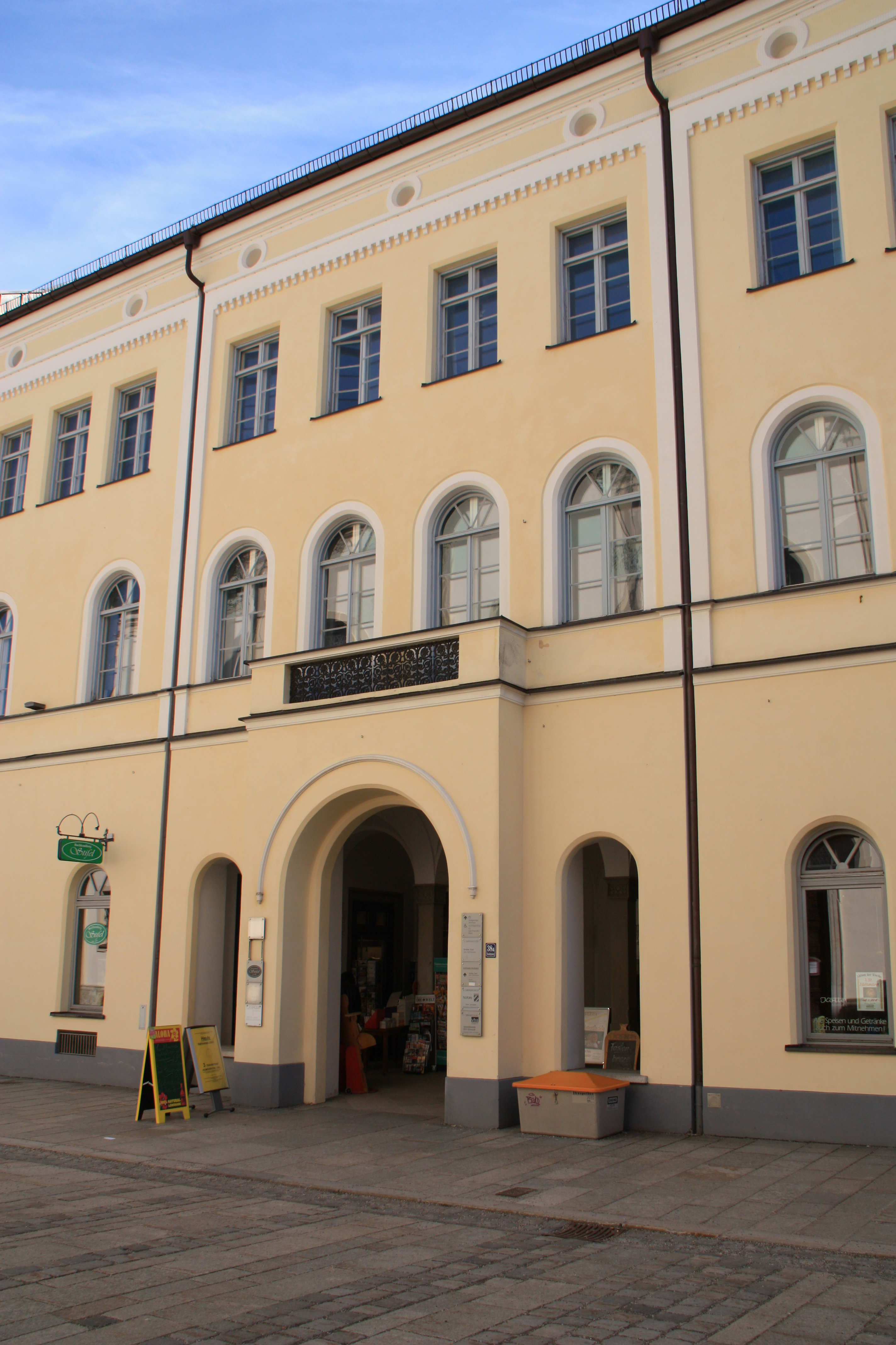 Das Alte Landgerichtsgebäude neben dem Rathaus am Traunsteiner Stadtplatz